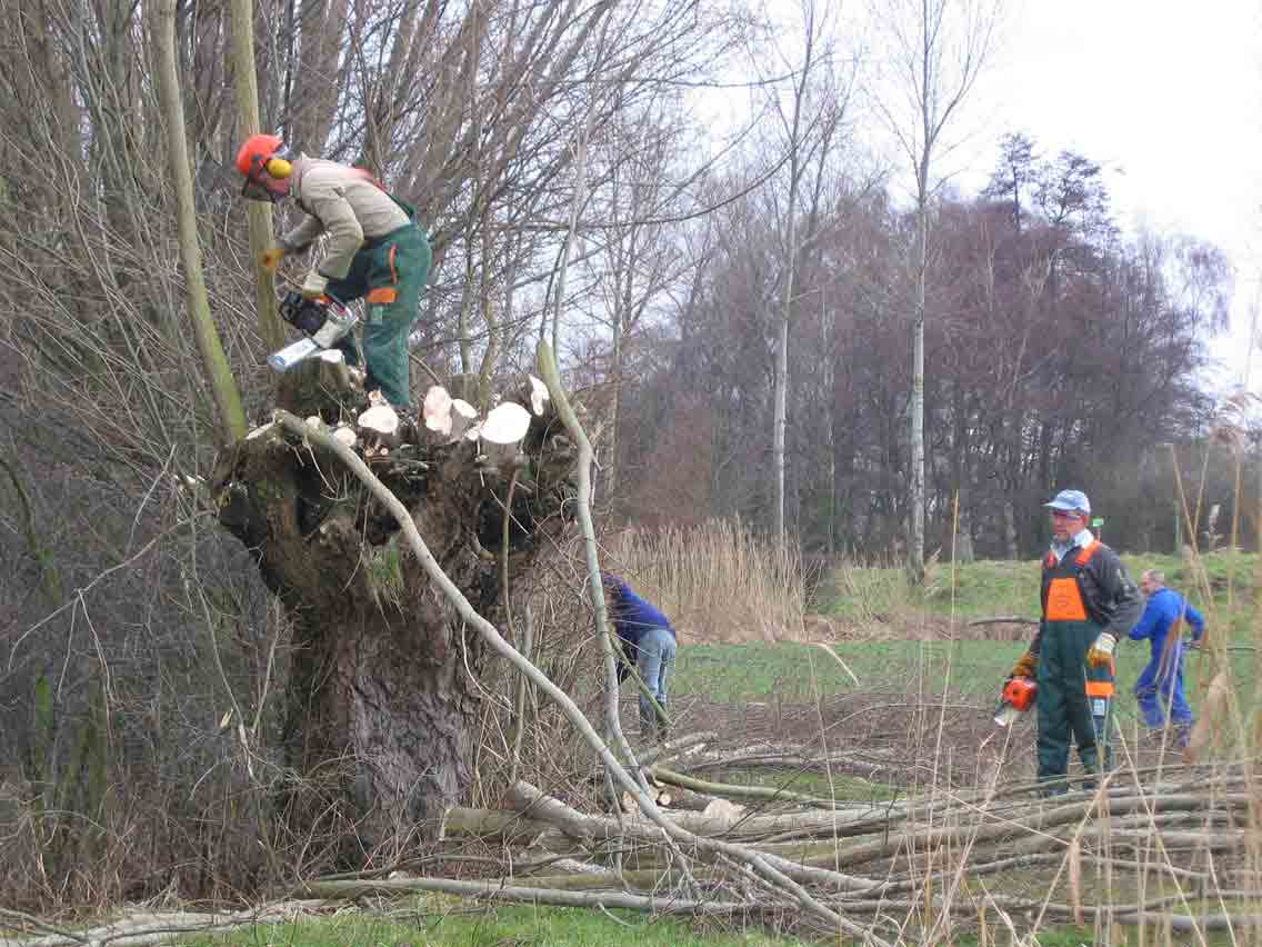 Foto genomen door een vrijwilliger van Natuurpunt, vrijgegeven voor promotie en publicatie